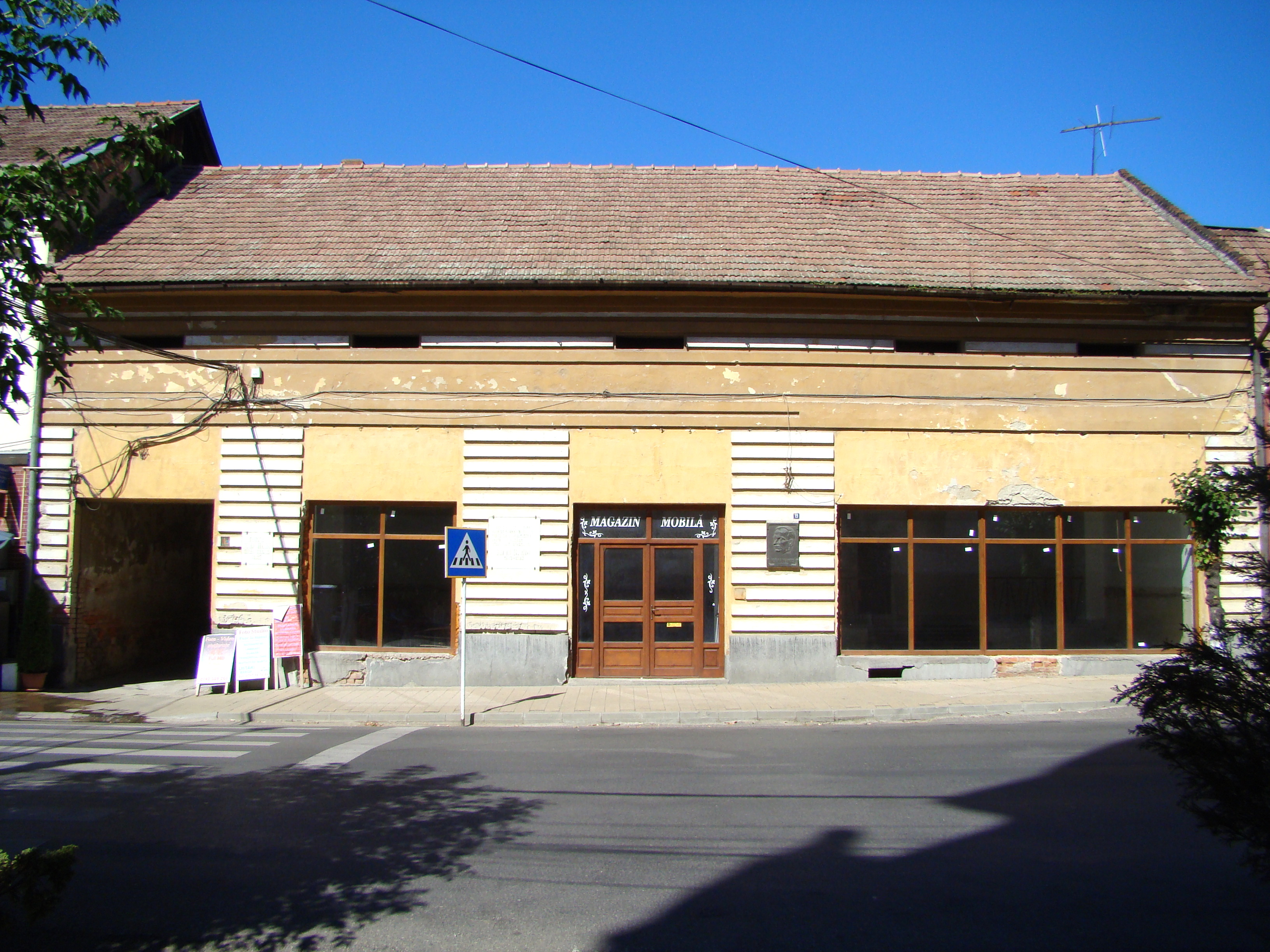 Casa Memorială „Iuliu Maniu”, azi sală de expoziții, oraș Șimleu Silvaniei, Str. 1 Decembrie 1918 19